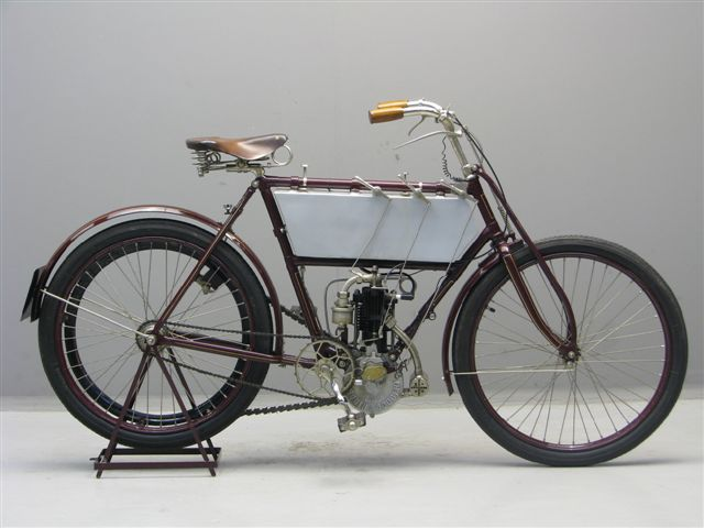 Lurquin Coudert motorcycle from 1904